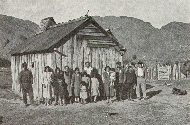 Colonos del río Baker, Aysén, hacia 1935.